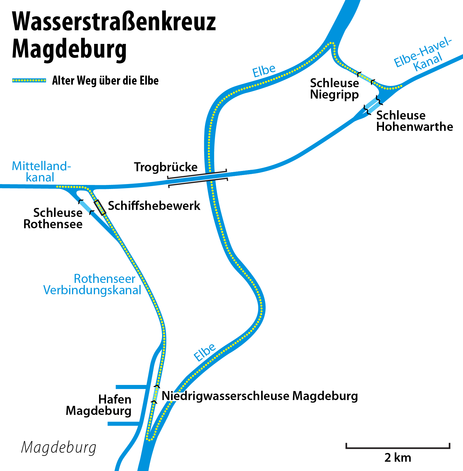 Karte des Wasserstraßenkreuzes Magdeburg